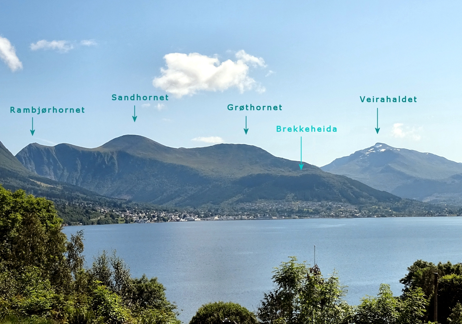 Ørsta sentrum, med fjellparti ved Brekkeheida i Ørsta. (Foto 2017)